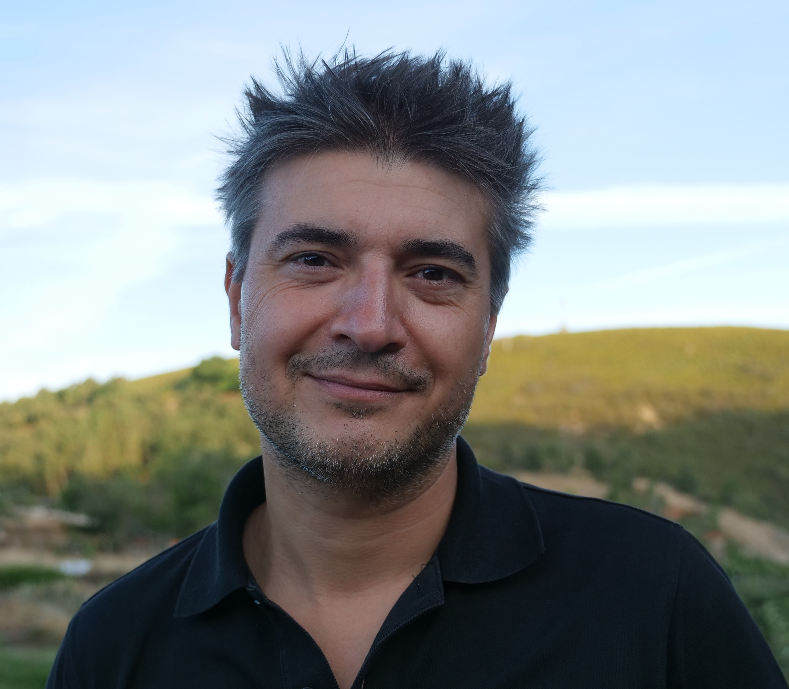 José Cruz, comédien humoriste